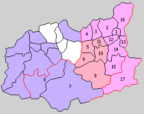 徳島県美馬郡の町村制時点の町村。